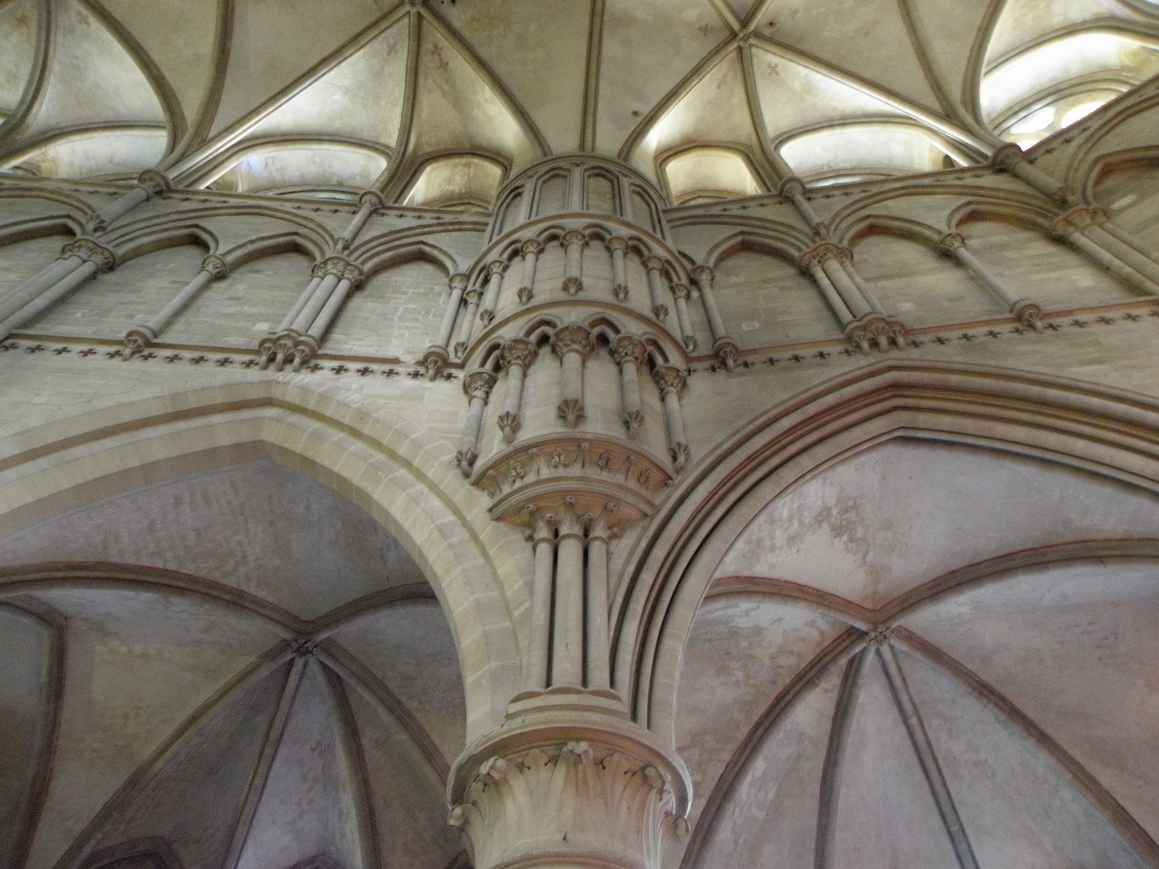 Voûtes du déambulatoire de la cathédrale Notre-Dame de Coutances (50).